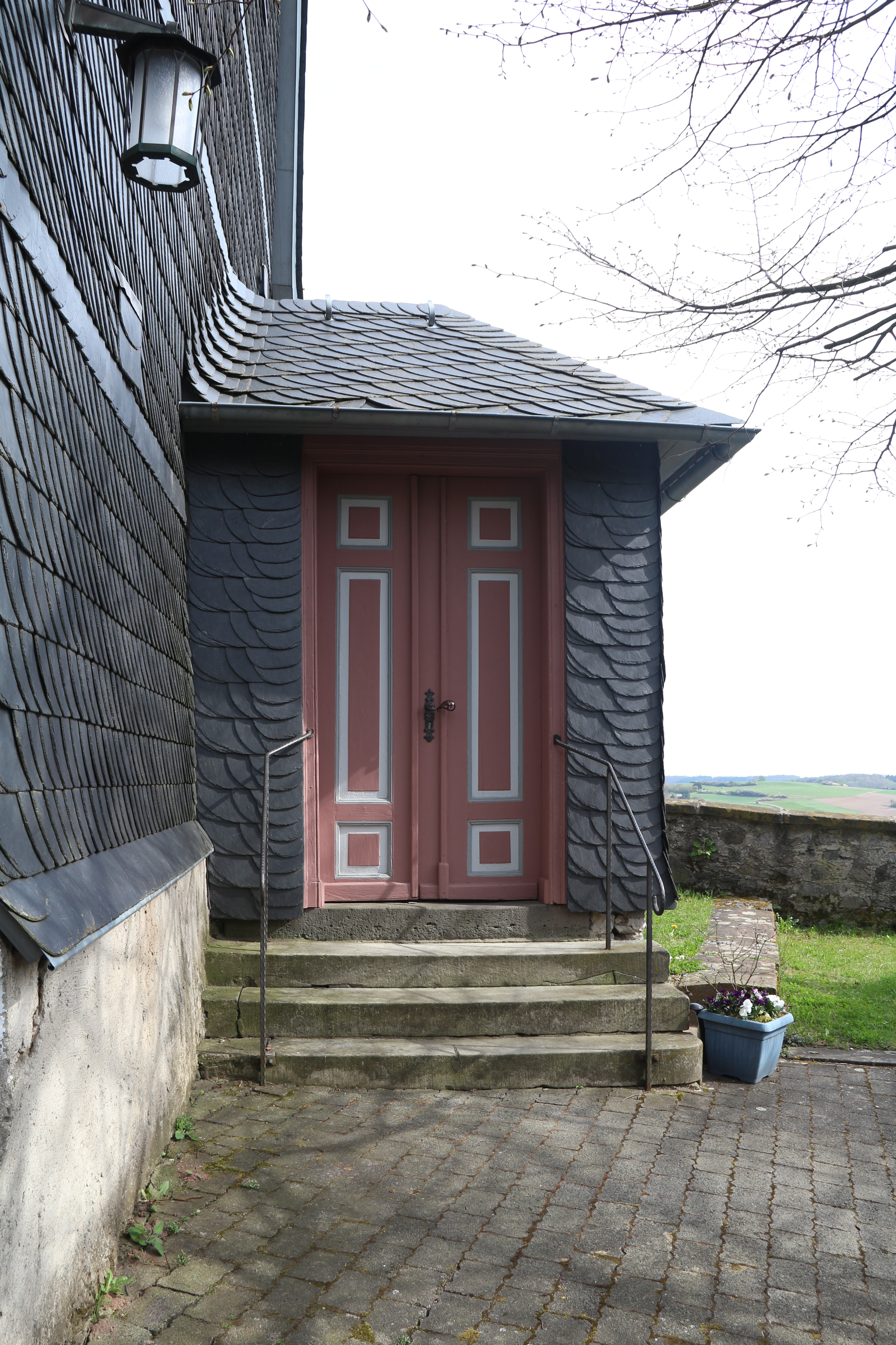 Königsberg